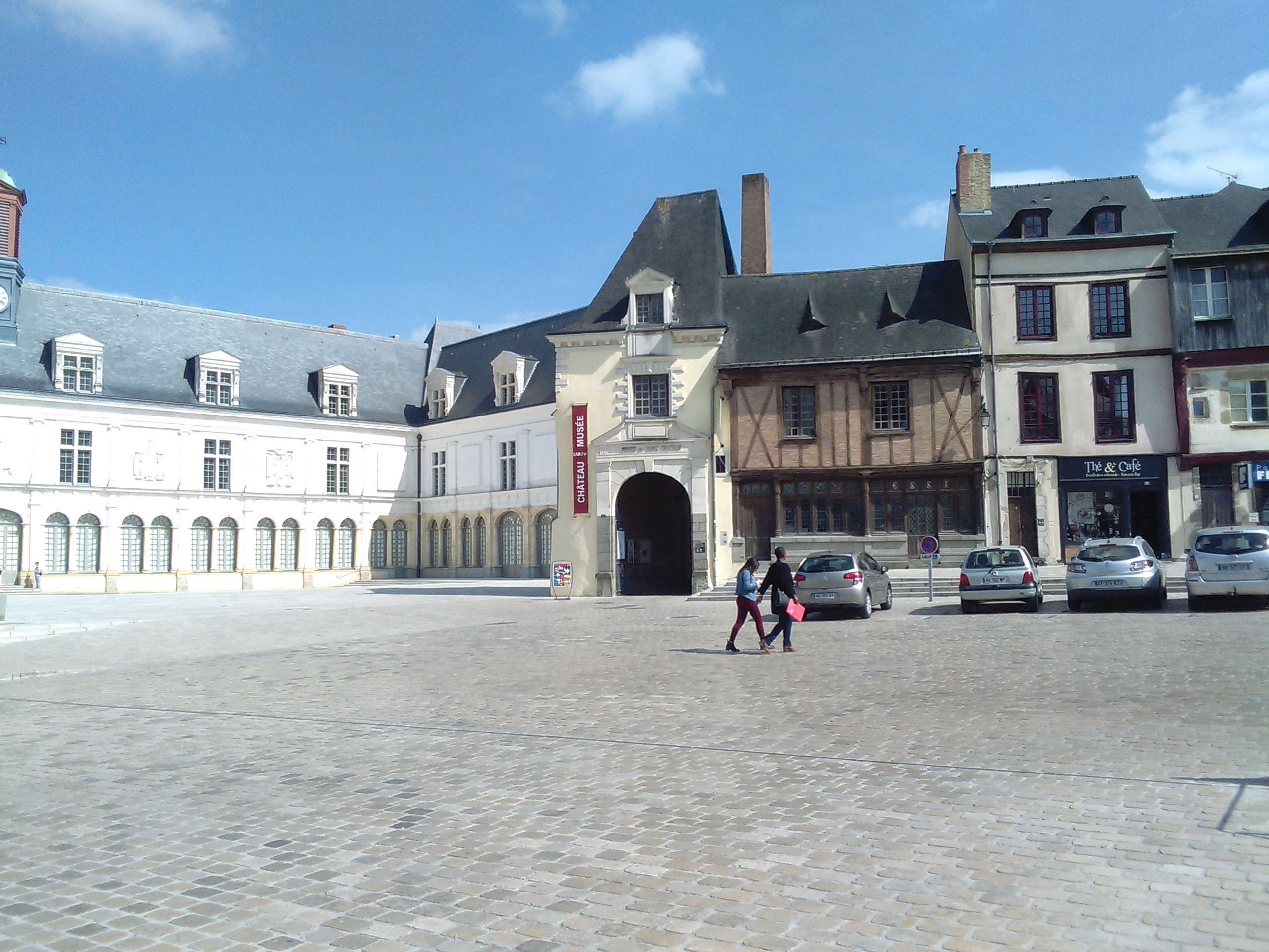 Musée du château de la ville de Laval (53) le 11 avril 2017.